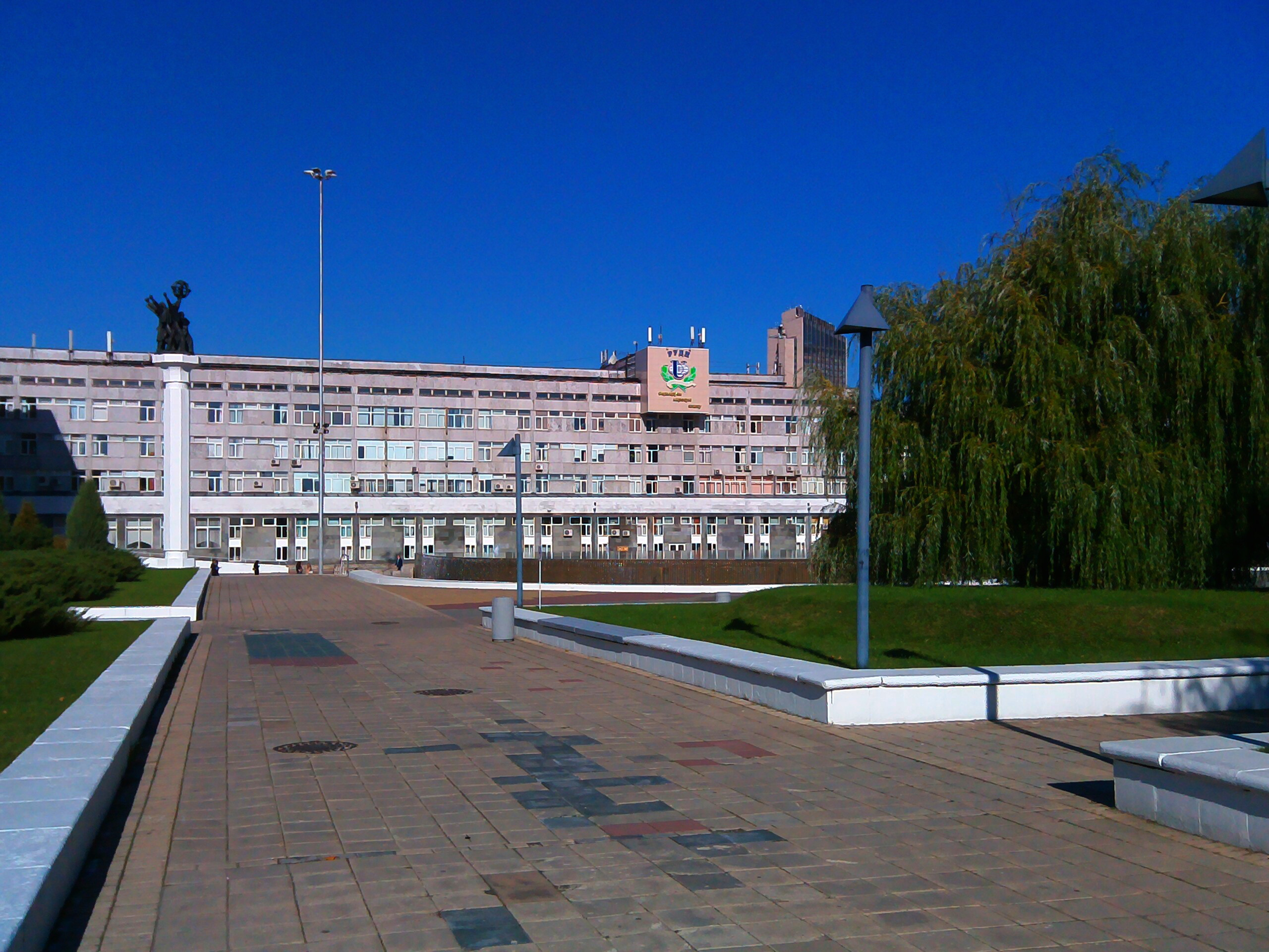 РУДН, главный корпус ("Крест"), вид на экономический факультет